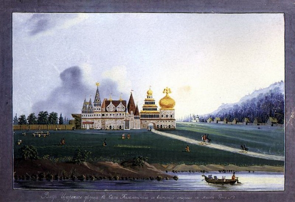 Деревянный дворец в Коломенском. Wooden palace in Kolomenskoe. 18th century picture.